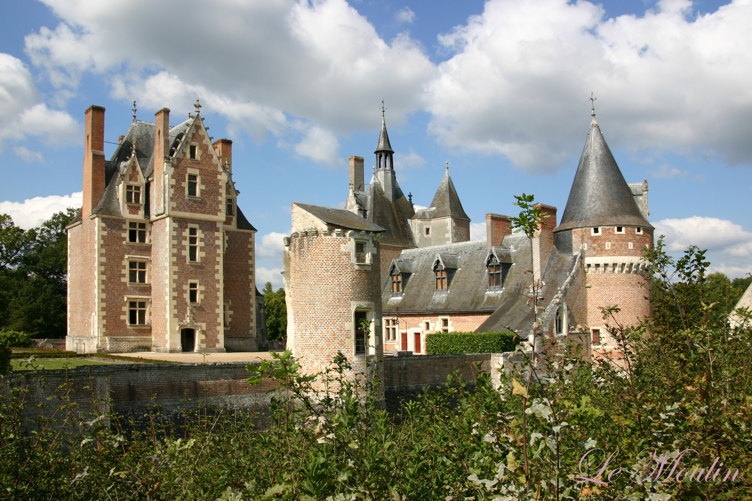 Schloss Le Moulin